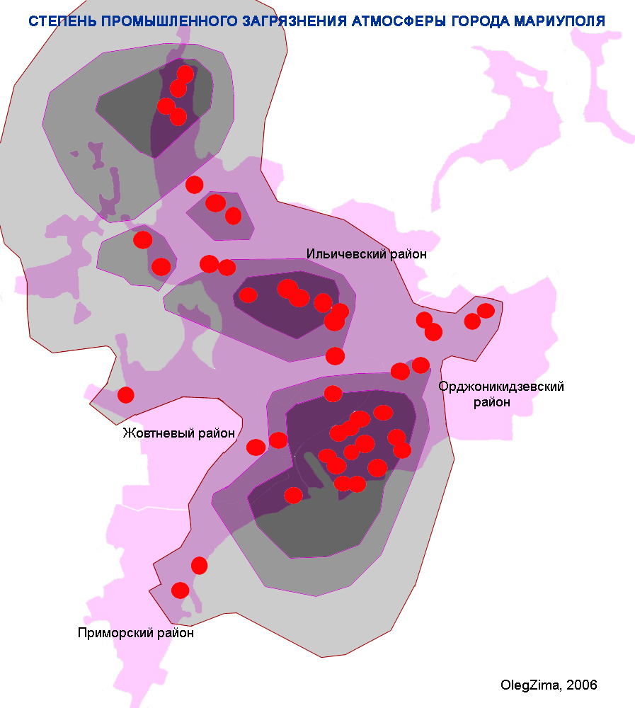 map